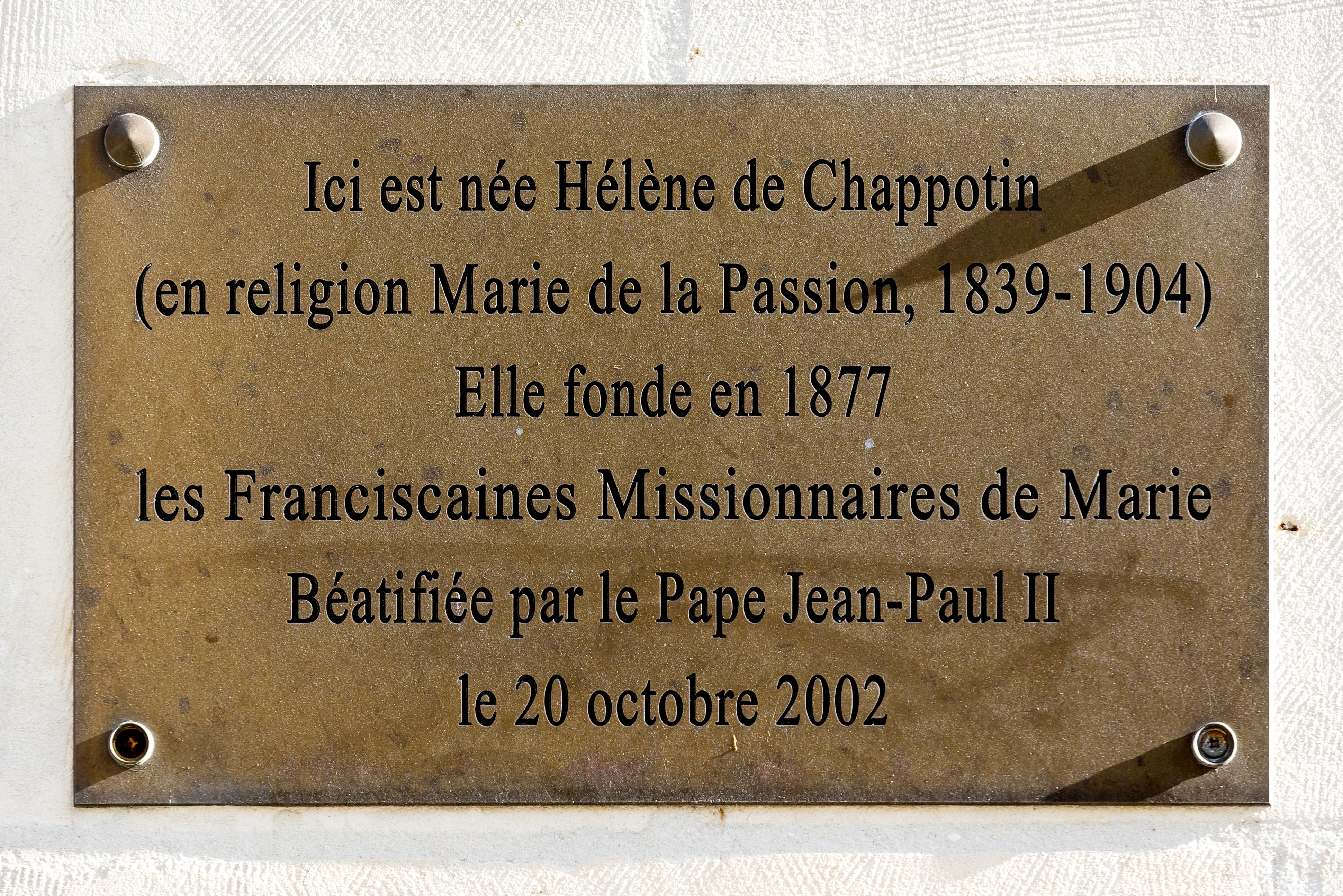 Plaque commémorative sur la maison natale d'Hélène de Chappotin de Neuville, rue Clemenceau à Nantes